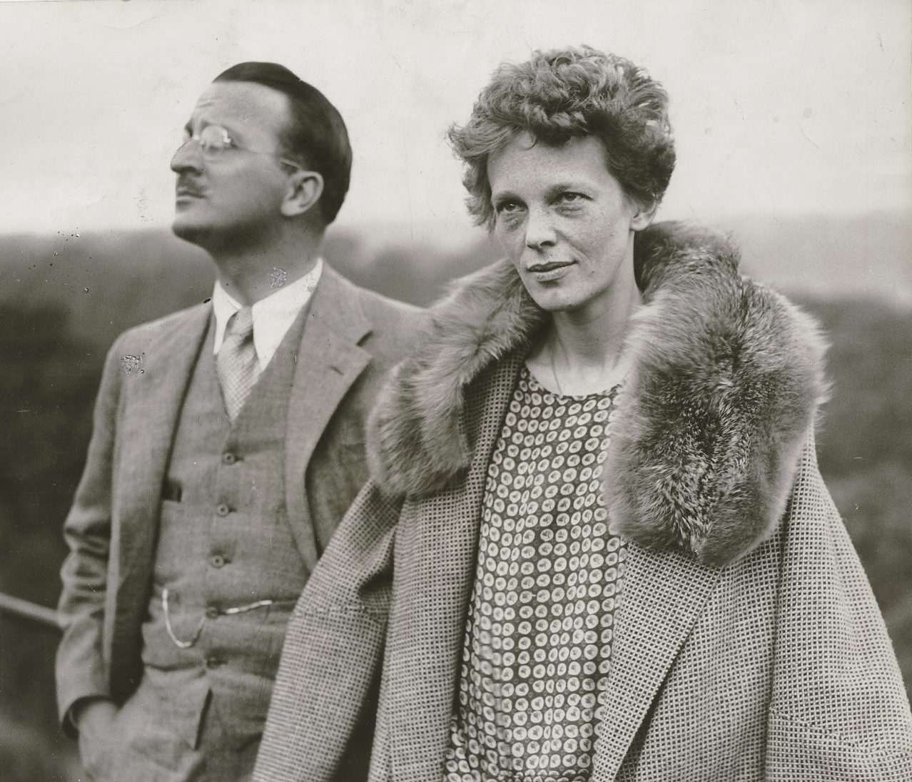 Putnam & Earhart